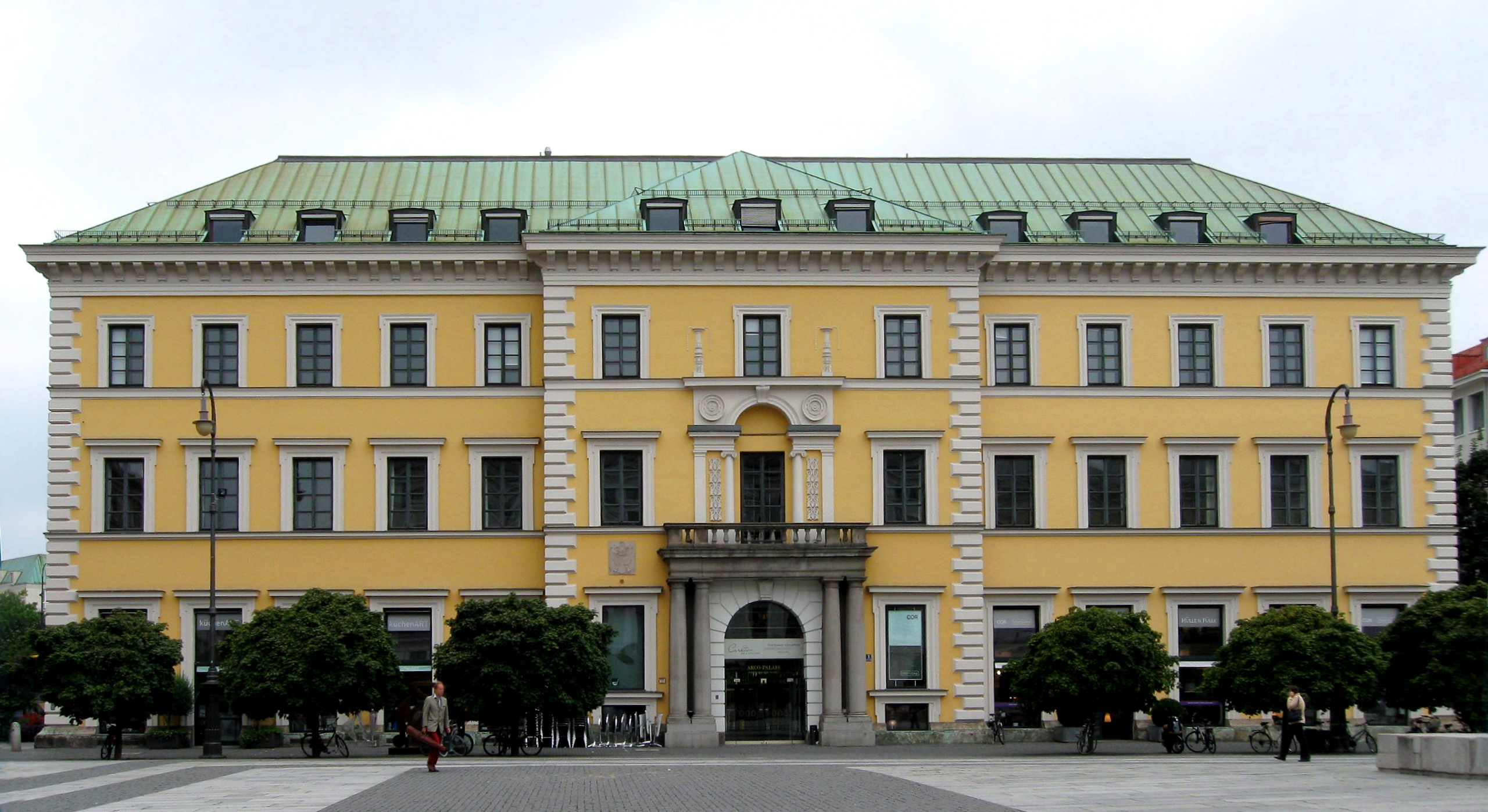 Wittelsbacherplatz 1. Ehem. Adelspalais, sog. Palais Arco-Zinneberg, dreigschossiger Walmdachbau mit Stuckfassade und Mittelrisalit, von Leo von Klenze, 1824/25, Rekonstruktion nach Kriegszerstörung 1959/60 mit originalem Säulenbalkon, Inneres modern.